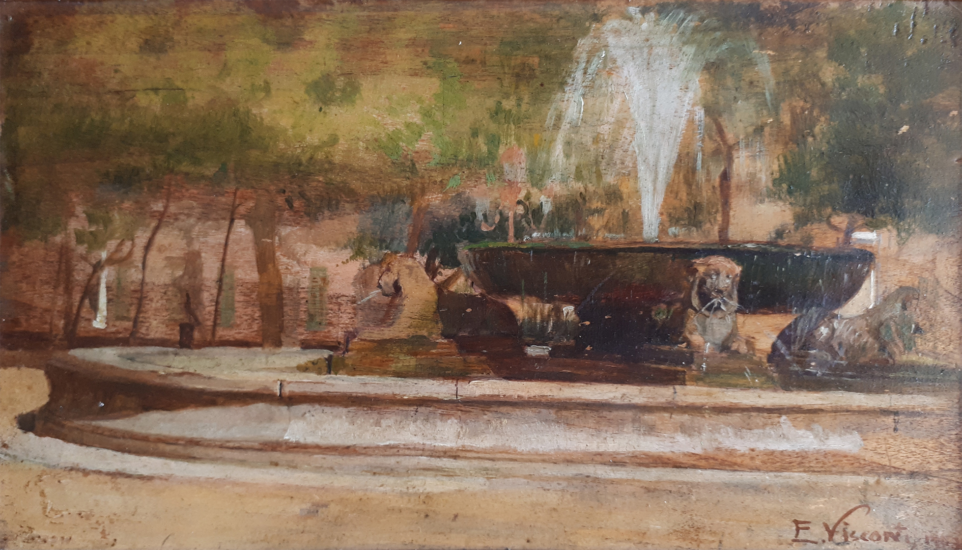 Obra do Projeto Eliseu Visconti